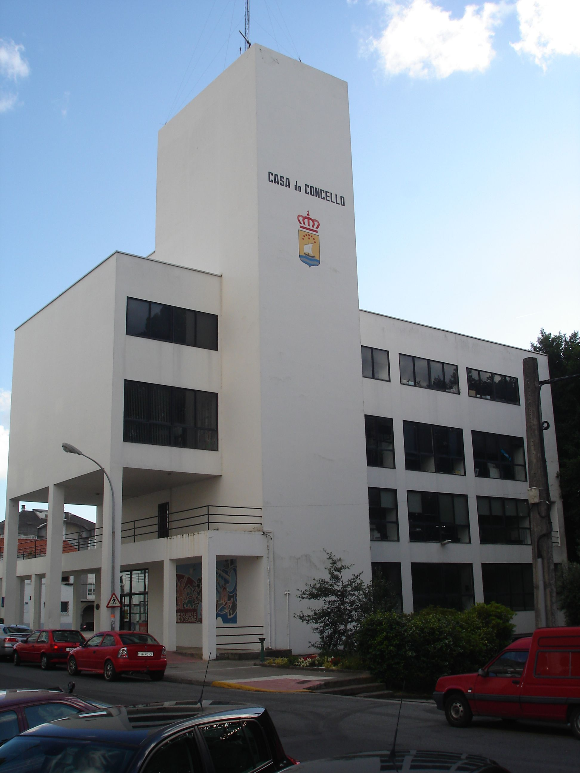 Casa do concello de Fene Fene Categoría:Imaxes de Fene